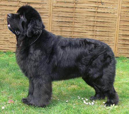 newfoundlanddog